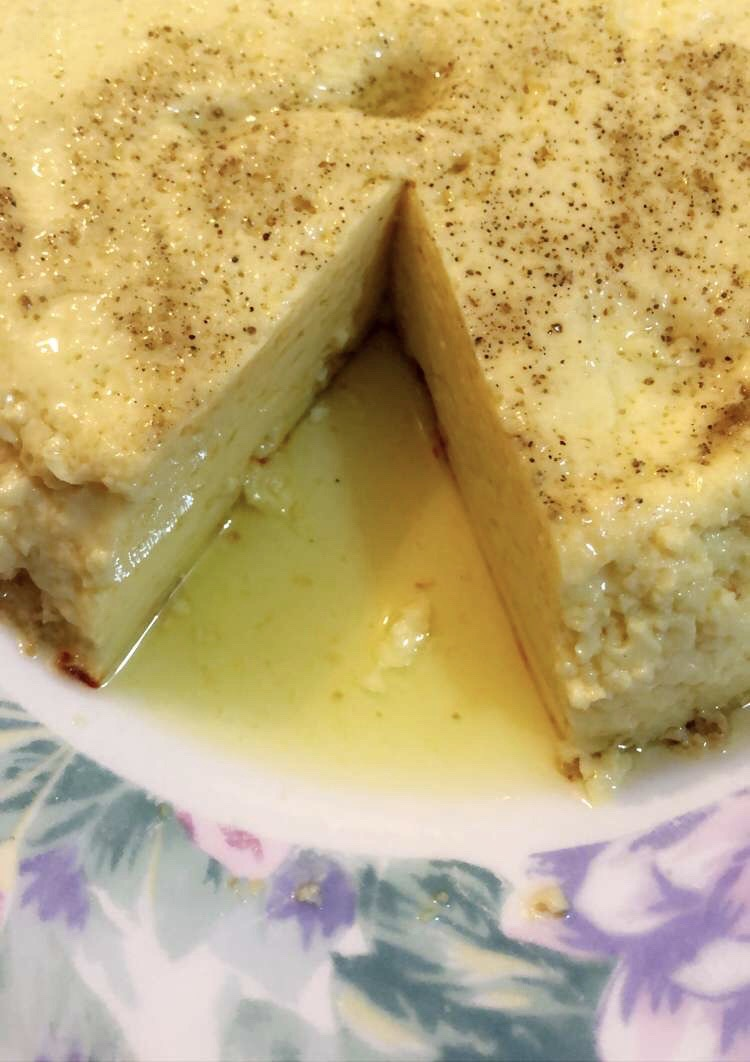 صورة لطبق من حلوى الإلبه الكويتيه